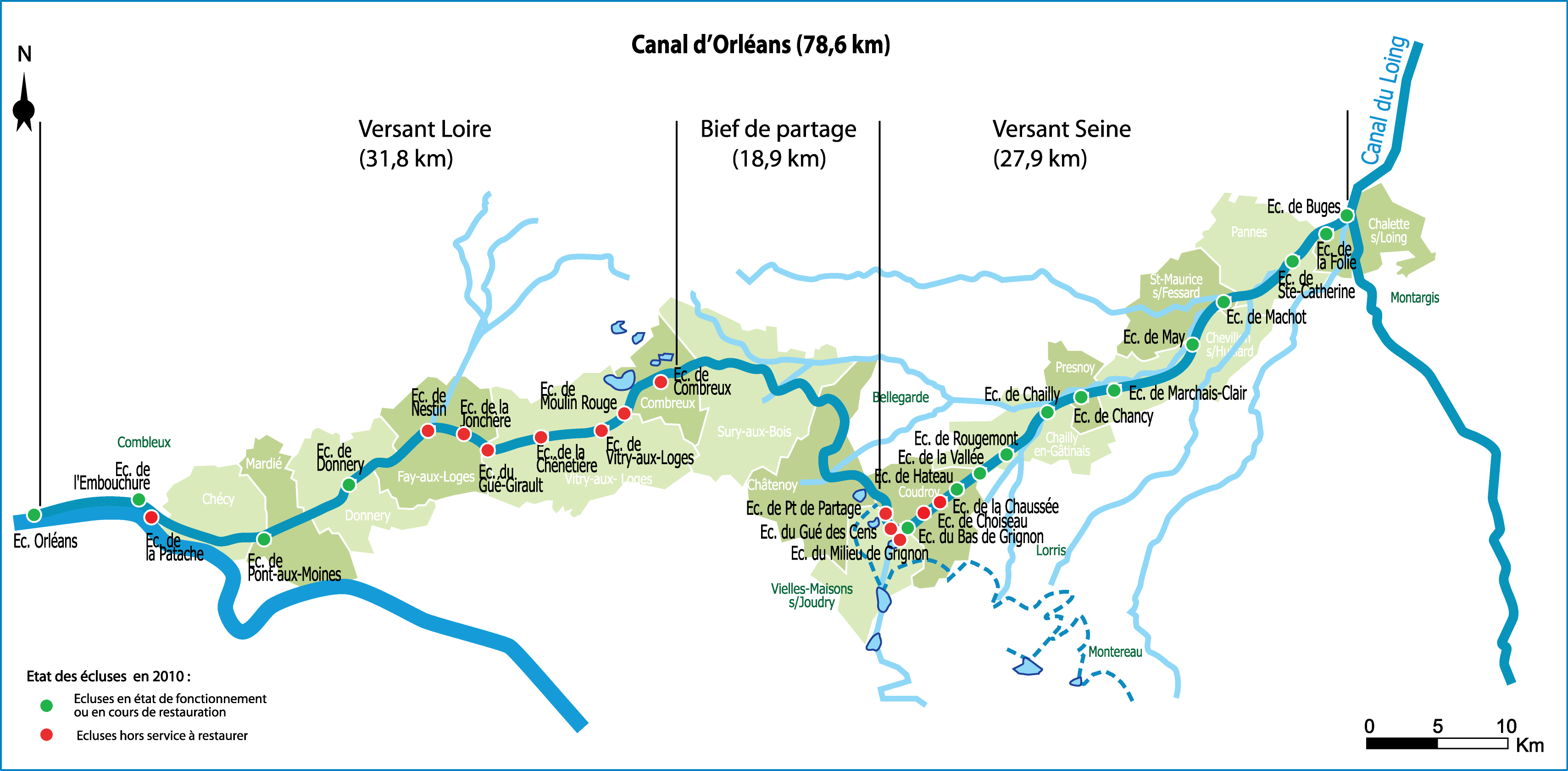 Canal d’Orléans. Schéma localisant les écluses et les communes traversées.